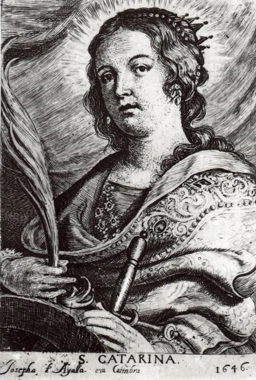 Gravura de Santa Catarina, primeira obra conhecida de Josefa de Óbidos datada de 1646.